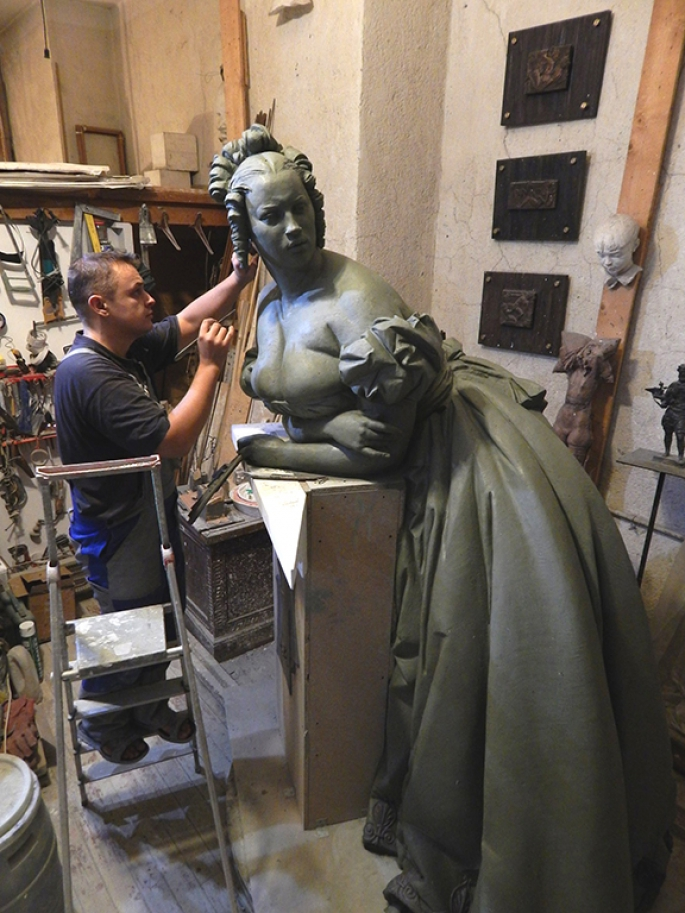 Скульптура в мастерской мастера